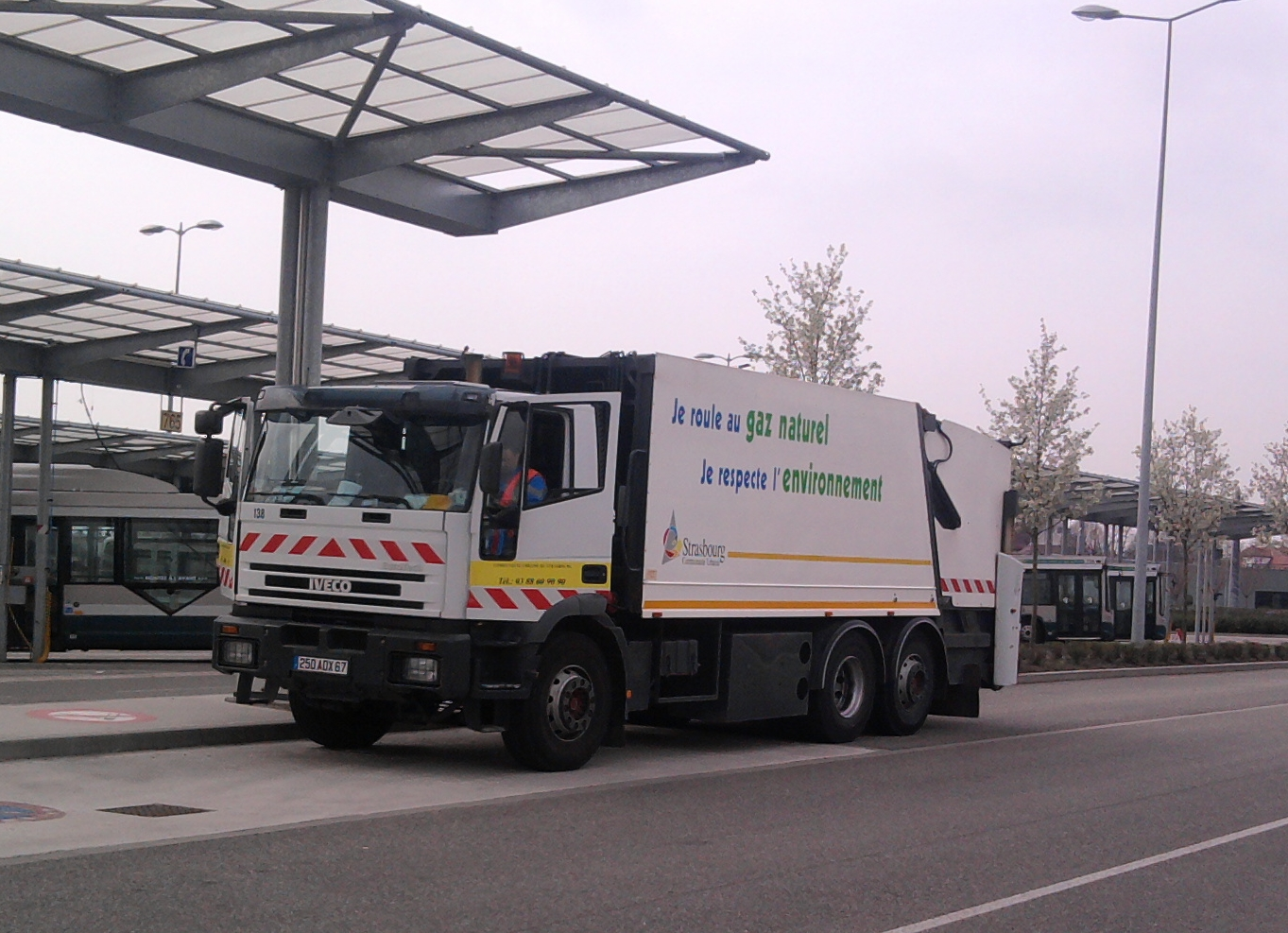 Camion poubelle IVECO de la ville de Strasbourg